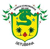 Brasão de Armas do município de Setubinha, Minas Gerais, Brasil.